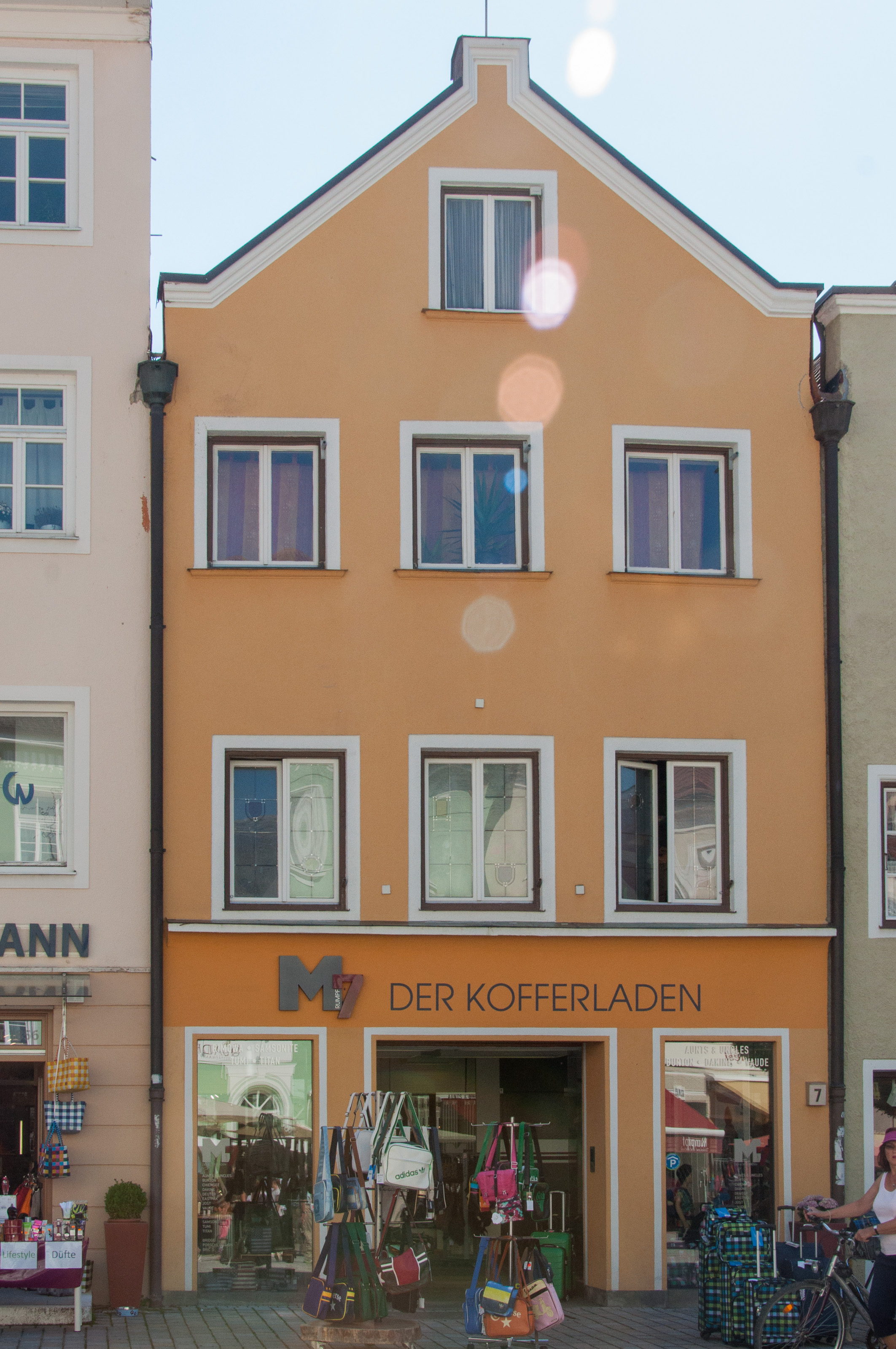 Wohn- und Geschäftshaus, sog. Sattler, dreigeschossiger verputzter Giebelbau mit Satteldach, im Kern 18. Jahrhundert, Ende 19. Jahrhundert umgebaut.This is a photograph of an architectural monument.